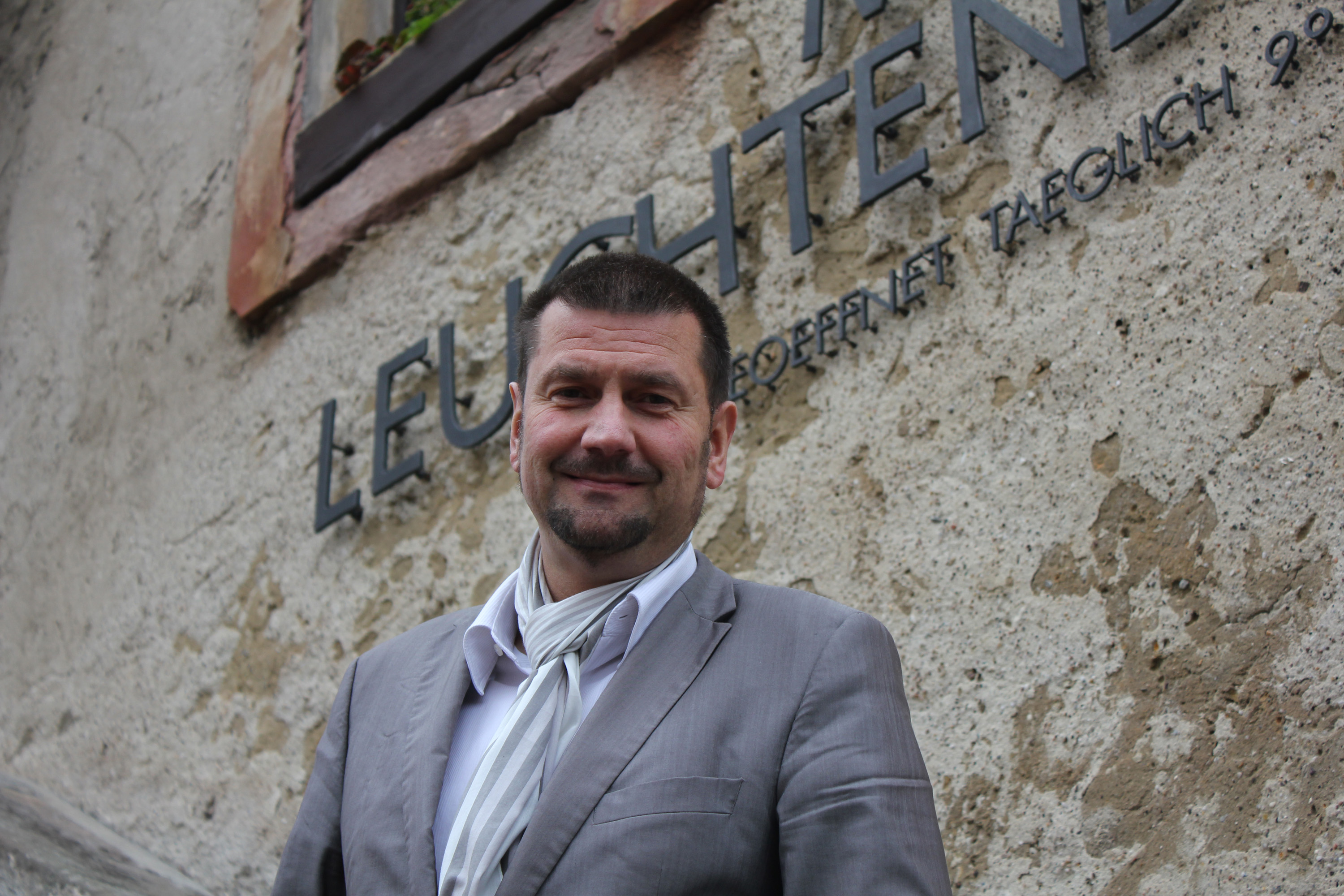 Sven-Erik Hitzer auf der Leuchtenburg